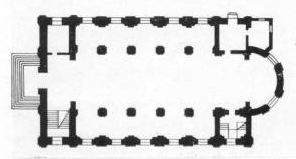 Брэст. План кафедральнага касцёла